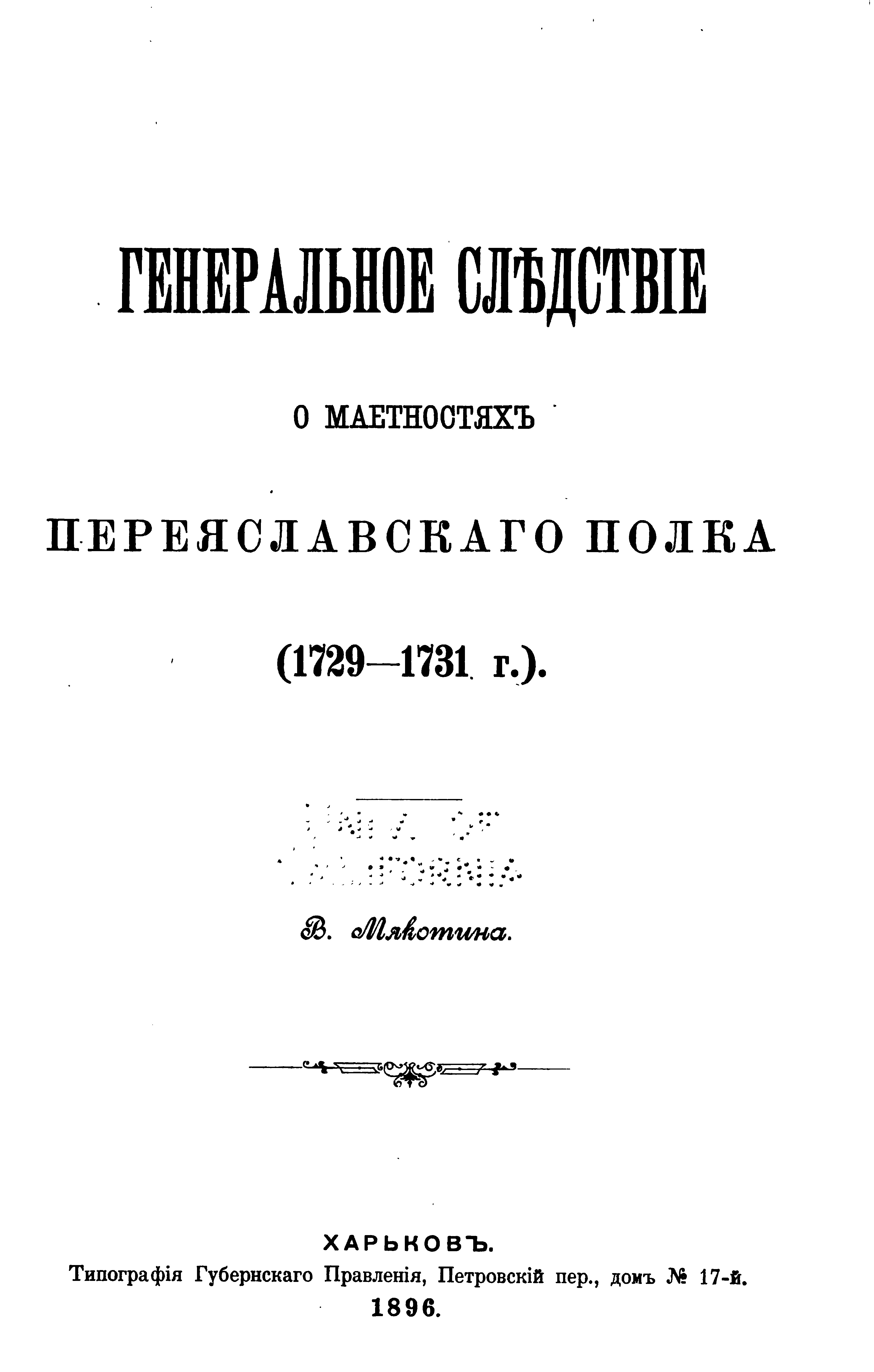 В.Мякотина 1896 “Генеральное следствие о маетностях Переясловского полка 1729-1731г.